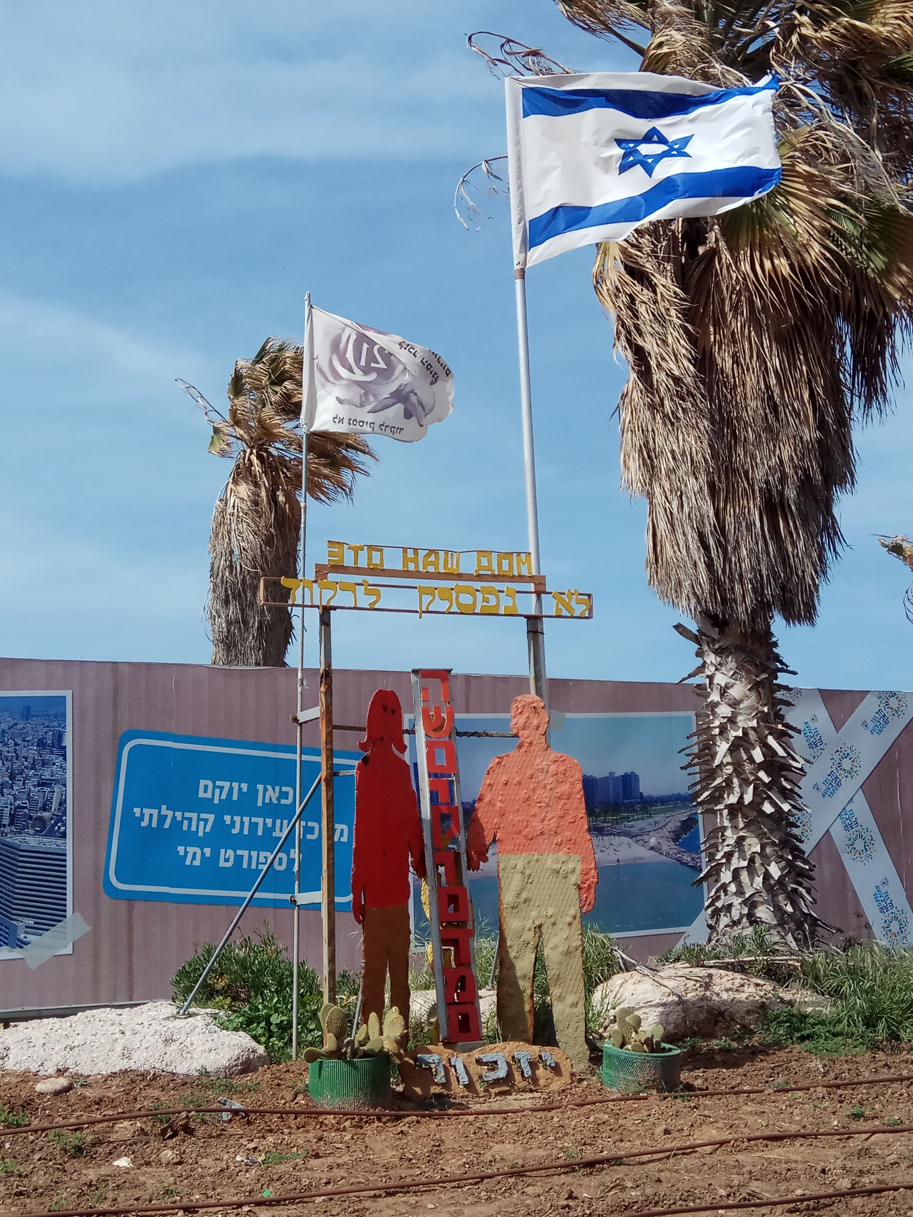 אנדרטת הפיגוע בדולפינריום